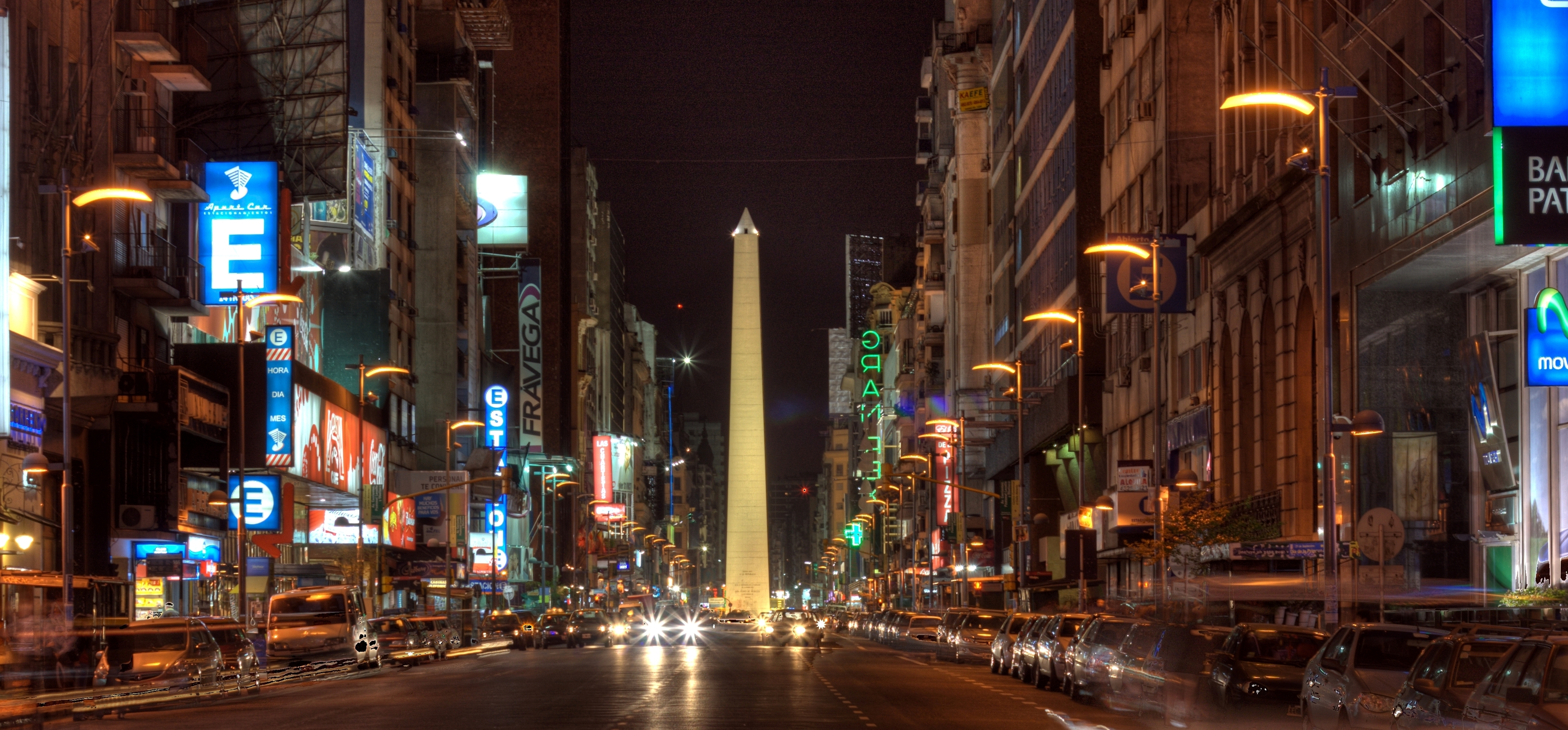 Avenida Corrientes, Buenos Aires, Argentina.